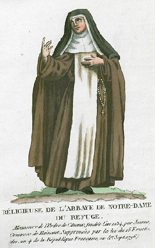 Collection de costumes de tous les ordres monastiques, supprimés à differentes époques, dans la ci-devant Belgique, Bruxelles, Philippe Joseph Maillart et sœur, 1811